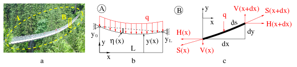 a: Hängebrücke, b: Freischnitt als ganzes und c: im Detail